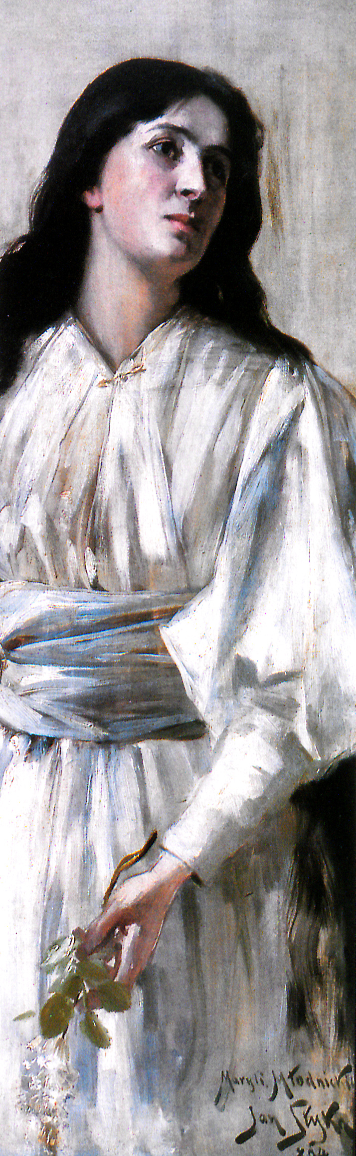 Portret Maryli Młodnickiej-Wolskiej